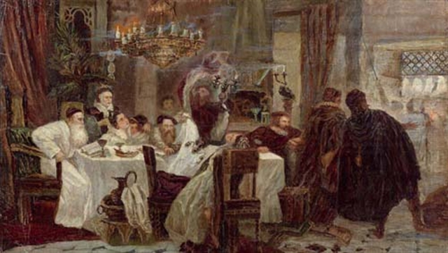 Marranos